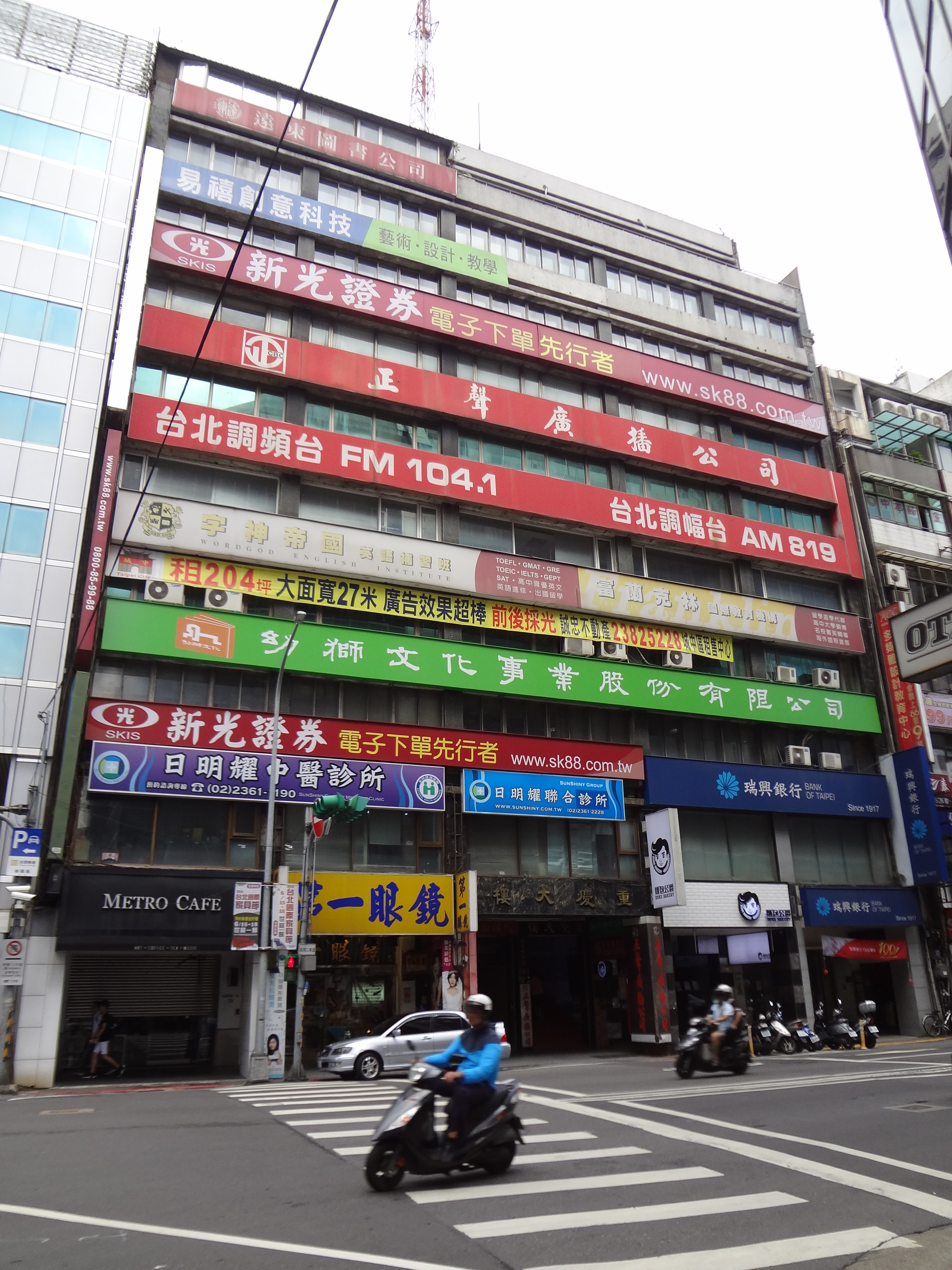 重慶大樓，位於臺北市中正區重慶南路一段66之1號，幼獅文化、遠東圖書、新光證券、正聲廣播公司總部皆設於其內。